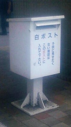 水戸駅北口にある白ポスト